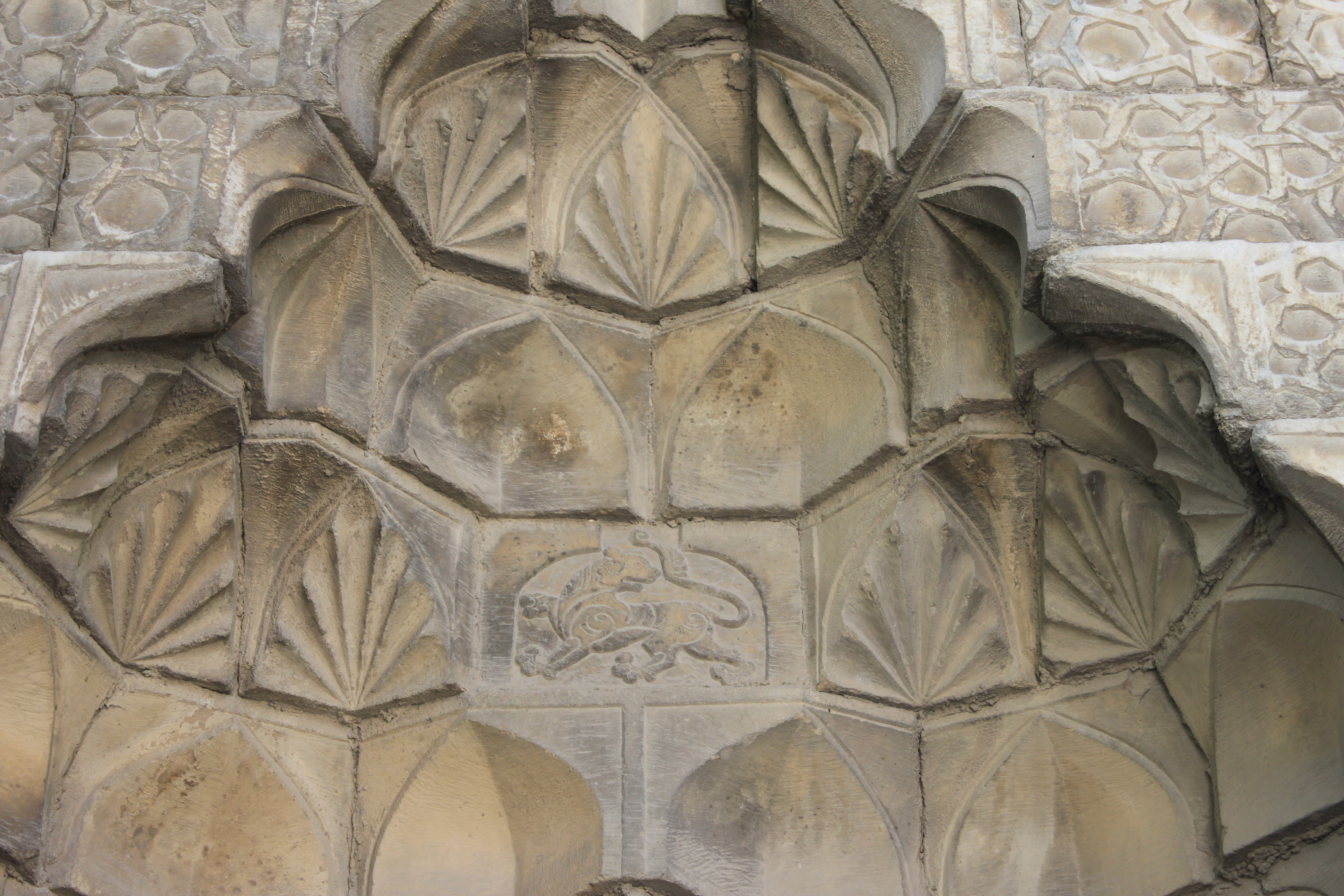 Seldschukische Muqarnas-Gewölbe mit Löwensiegel aus dem Jahre 1278.